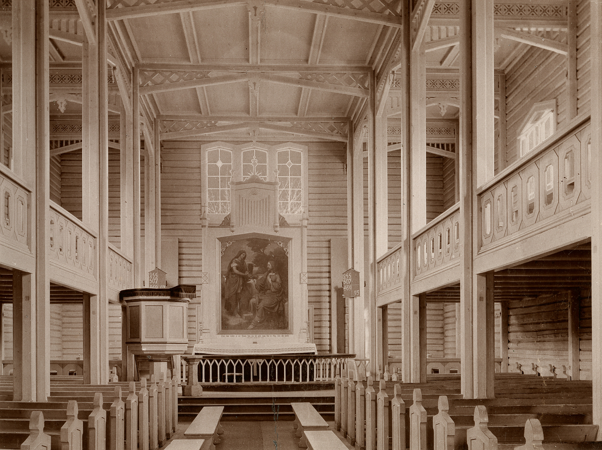 Interiør i Nedre Eiker kirke. Alterbilde malt av Christen Brun. Foto: C. Christensen Thomhav, fra Riksantikvarens Kulturminnebilder